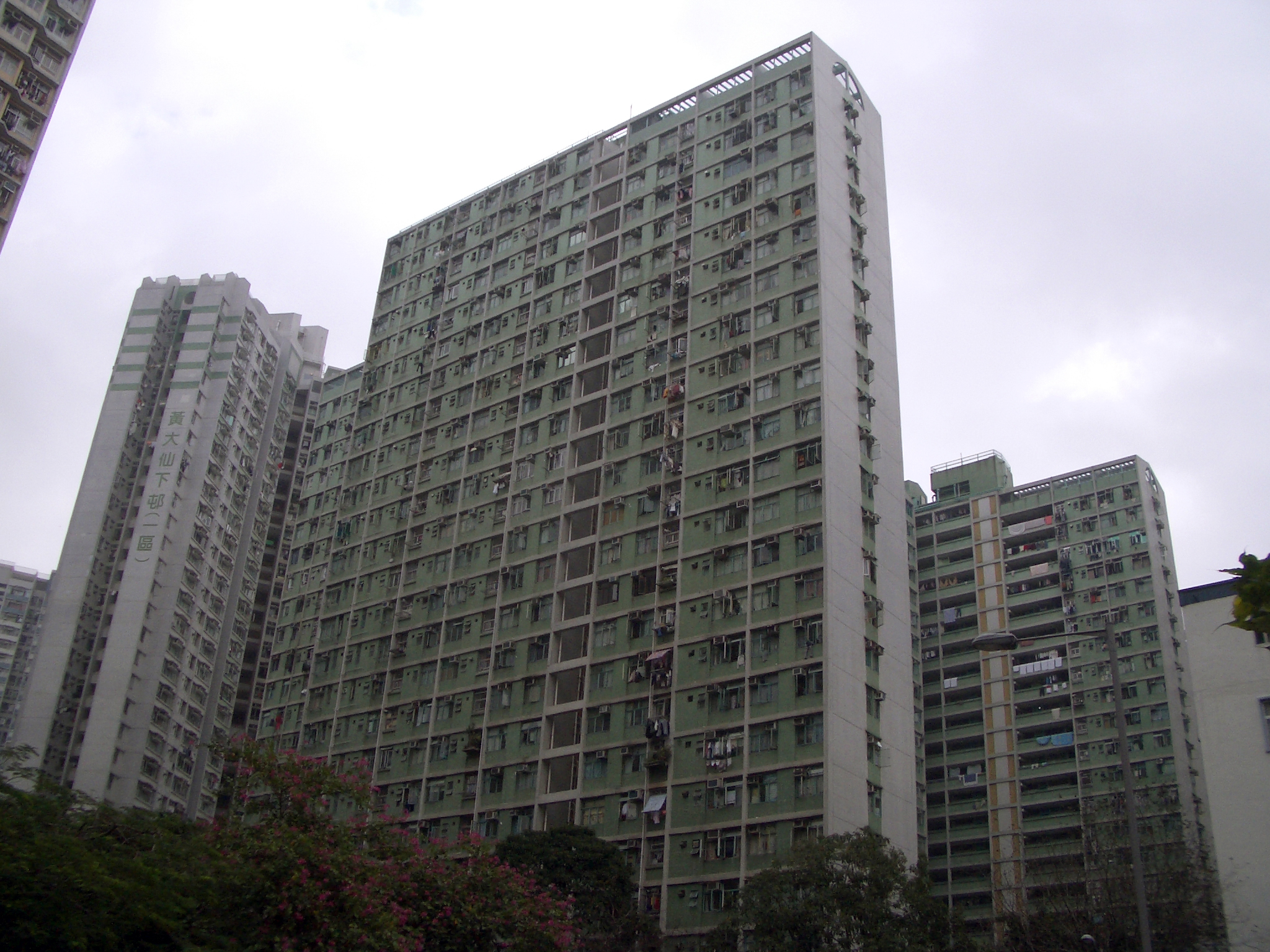 Lung Wing Hse, Lower Wong Tai Sin Est, Kowloon, Hong Kong